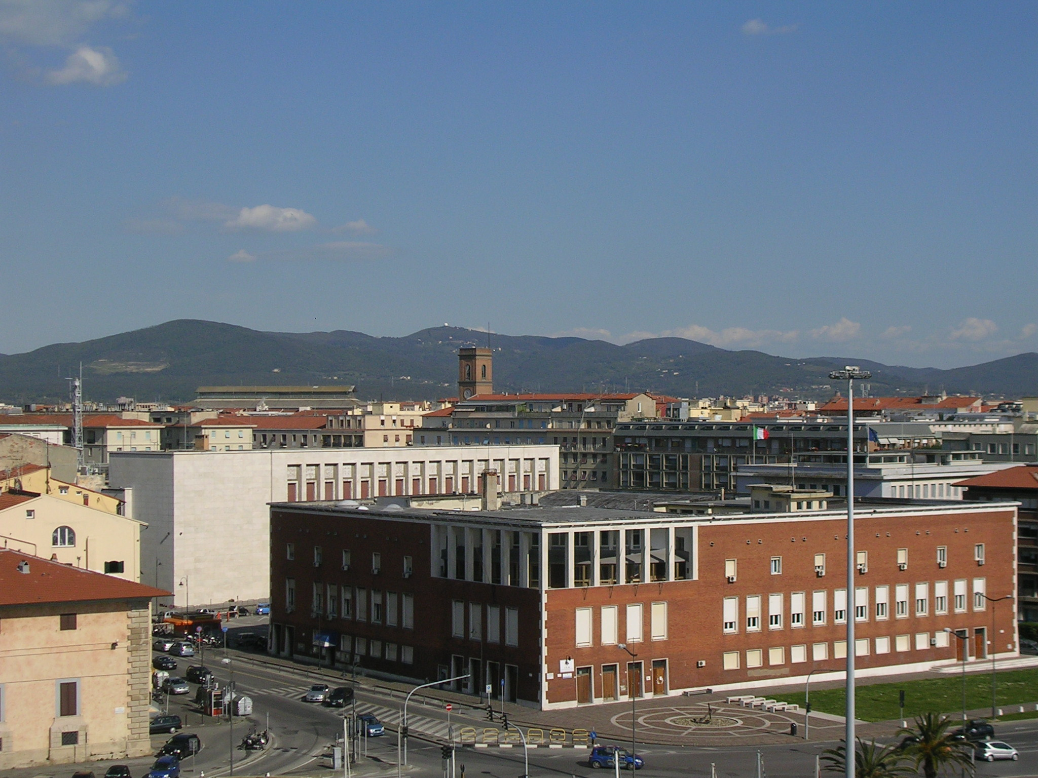 Livorno: veduta del centro cittadino dalla Fortezza Vecchia.